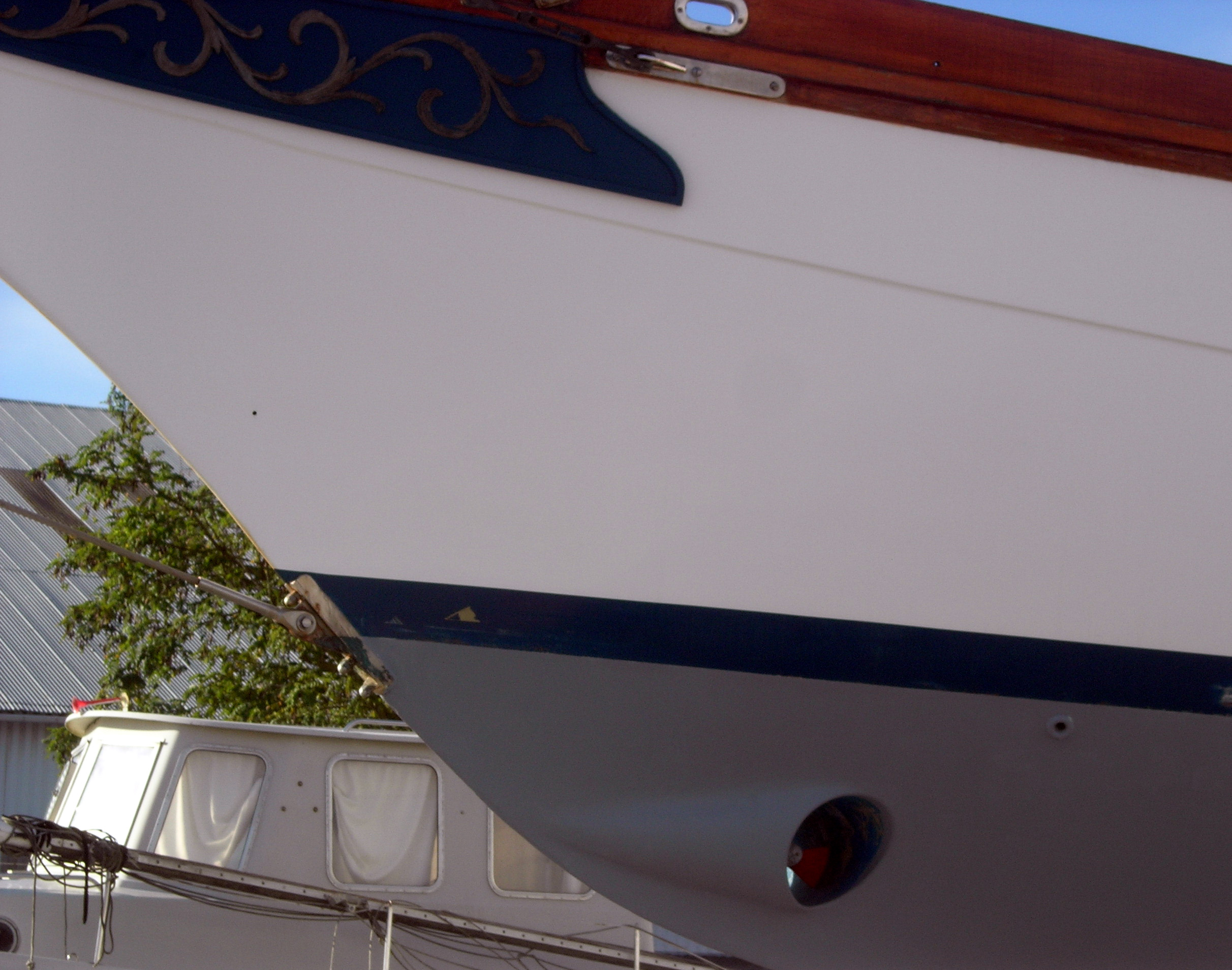 Description =Hélice d'étrave d'un bateau de plaisance Source =Photo taken by Remi Jouan Date =Octobre 2006 Author =Remi Jouan